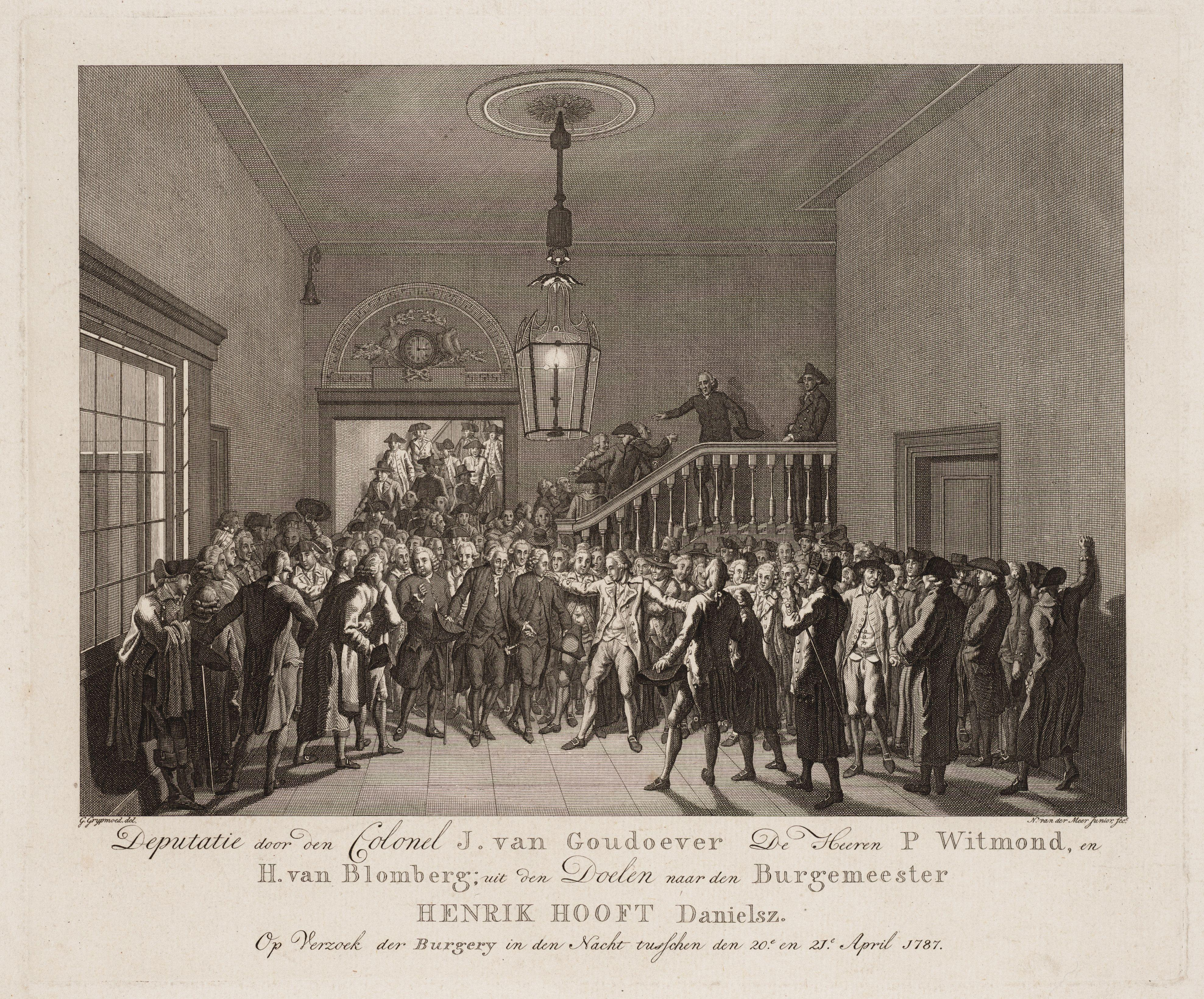 Beschrijving Deputatie door den Colonel J. van Goudoever ... etc Deputatie door kolonel J. van Goudoever en de heren P. Witmond en H. van Blomberg naar burgemeester Henrik Hooft Daniëlsz. bij hun vertrek uit de Garnalendoelen, Singel 421. Afmetingen: (blad) 375x484 mm., (afbeelding) 209x292 mm. Documenttype prent Vervaardiger Meer Jr., Noach van der Grijpmoed, Geerlig (1760-1788) Collectie Collectie Stadsarchief Amsterdam: tekeningen en prenten Datering 1787 ca. Geografische naam Singel Inventarissen Afbeeldingsbestand 010097014929